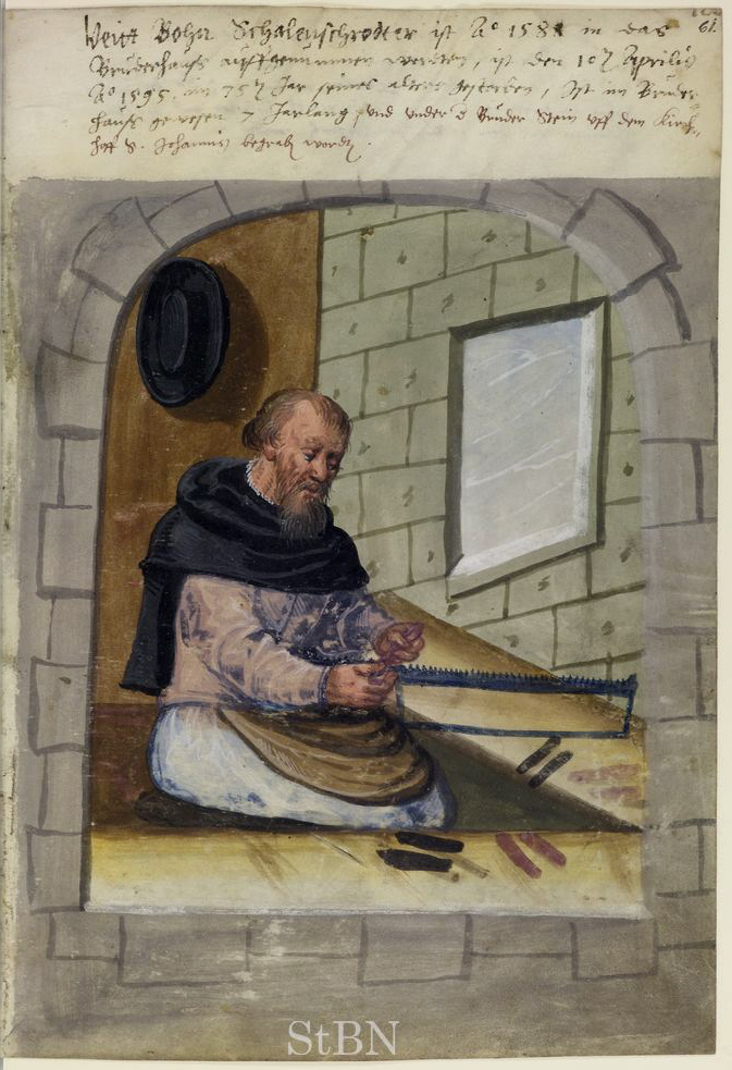 Transkription und weitere Informationen Veitt (Veit) Bohn, Schalenschrodter (Schalenschroter)